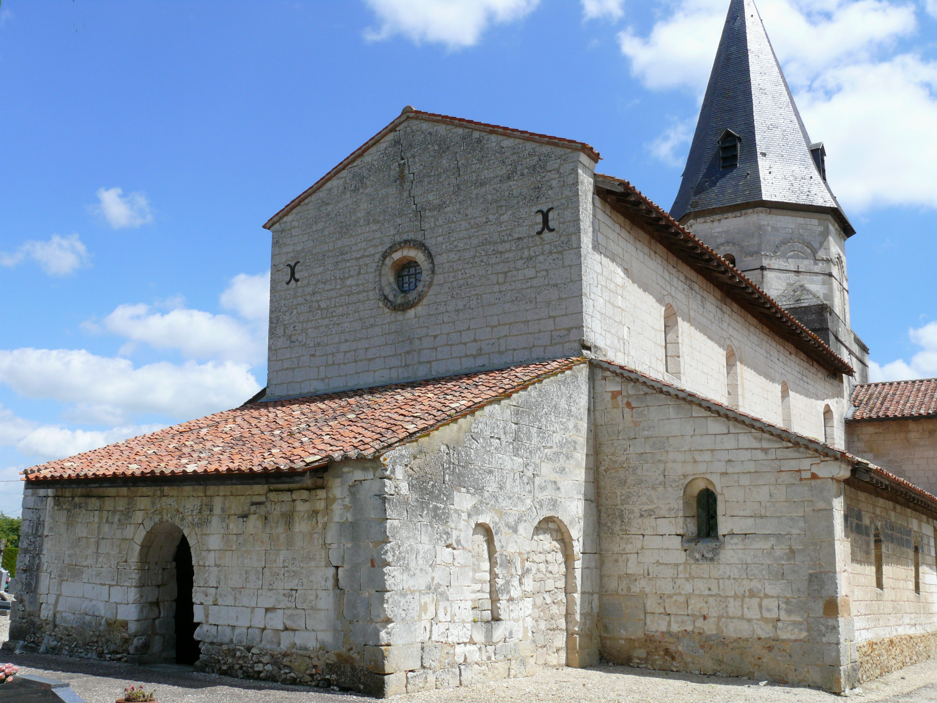 La Chaussée-sur-Marne - Coulmiers - Eglise Saint-Pierre-ès-Liens